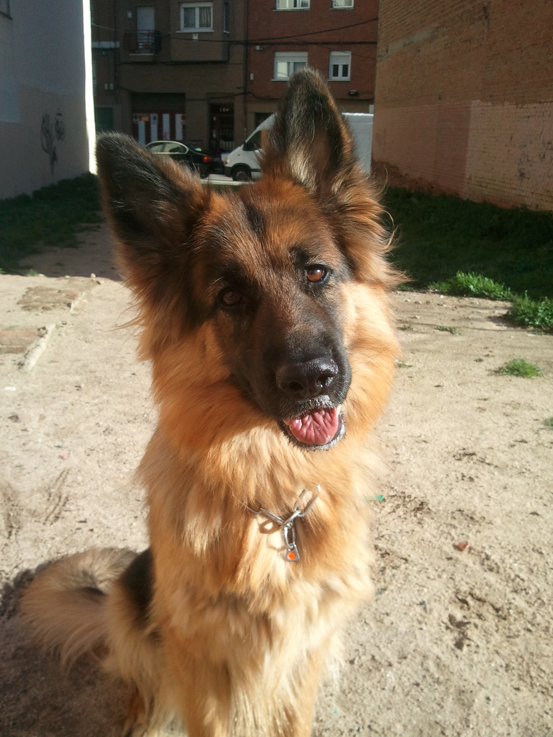 Campeona Nacional Clase Cachorro y 2ª Campeona Internacional Clase Juvenil